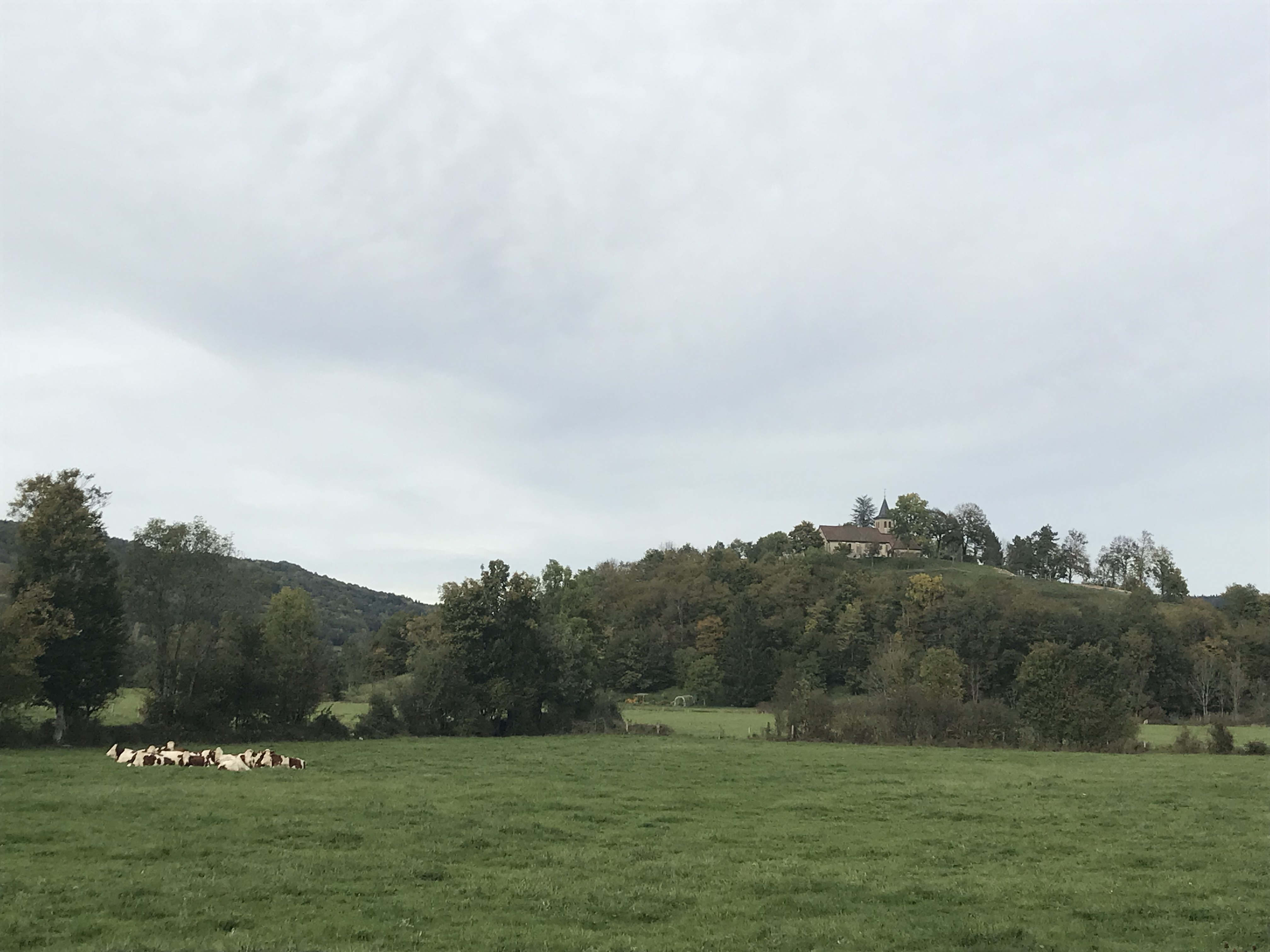 Graye-et-Charnay (Jura, France) en octobre 2017.